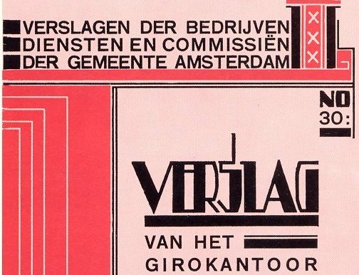 Verslag Girokantoor (1930) Fre Cohen